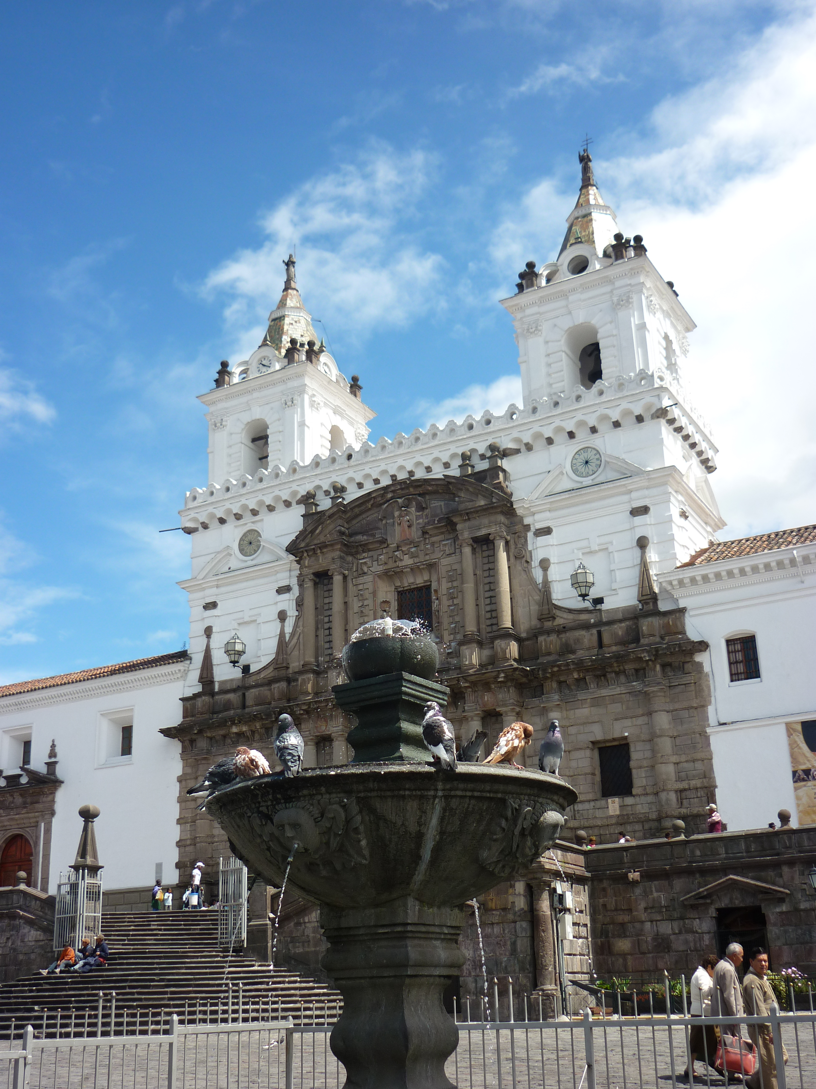 Iglesia San Francisco en Quito Ecuador